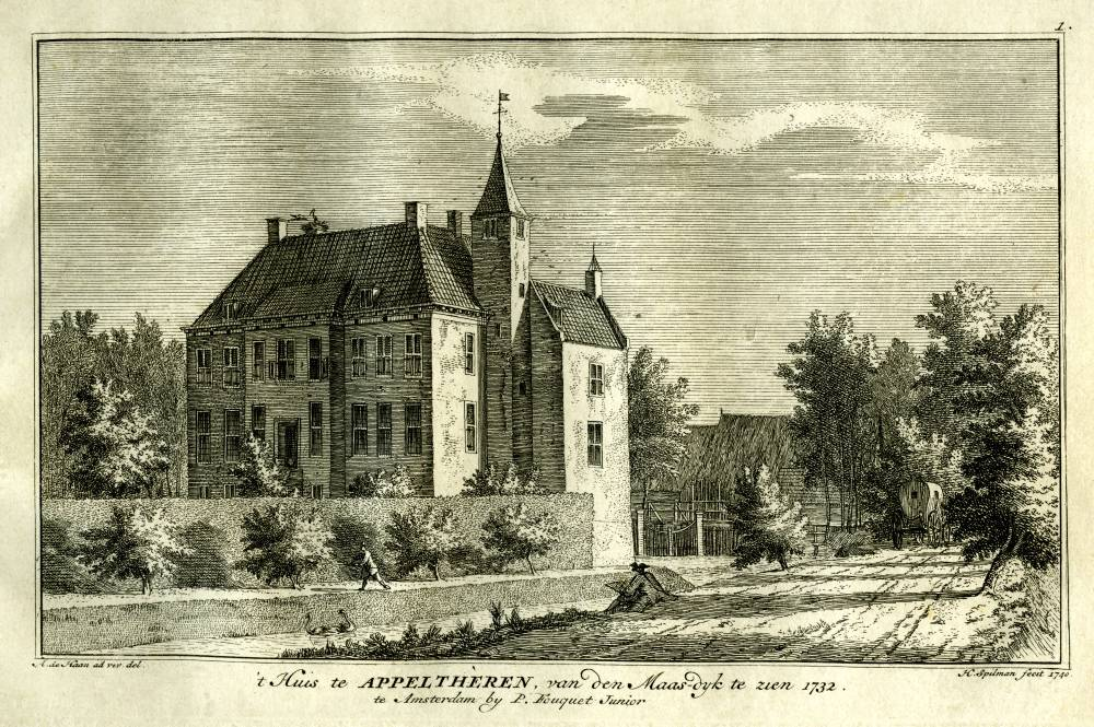 Kasteel Appeltern